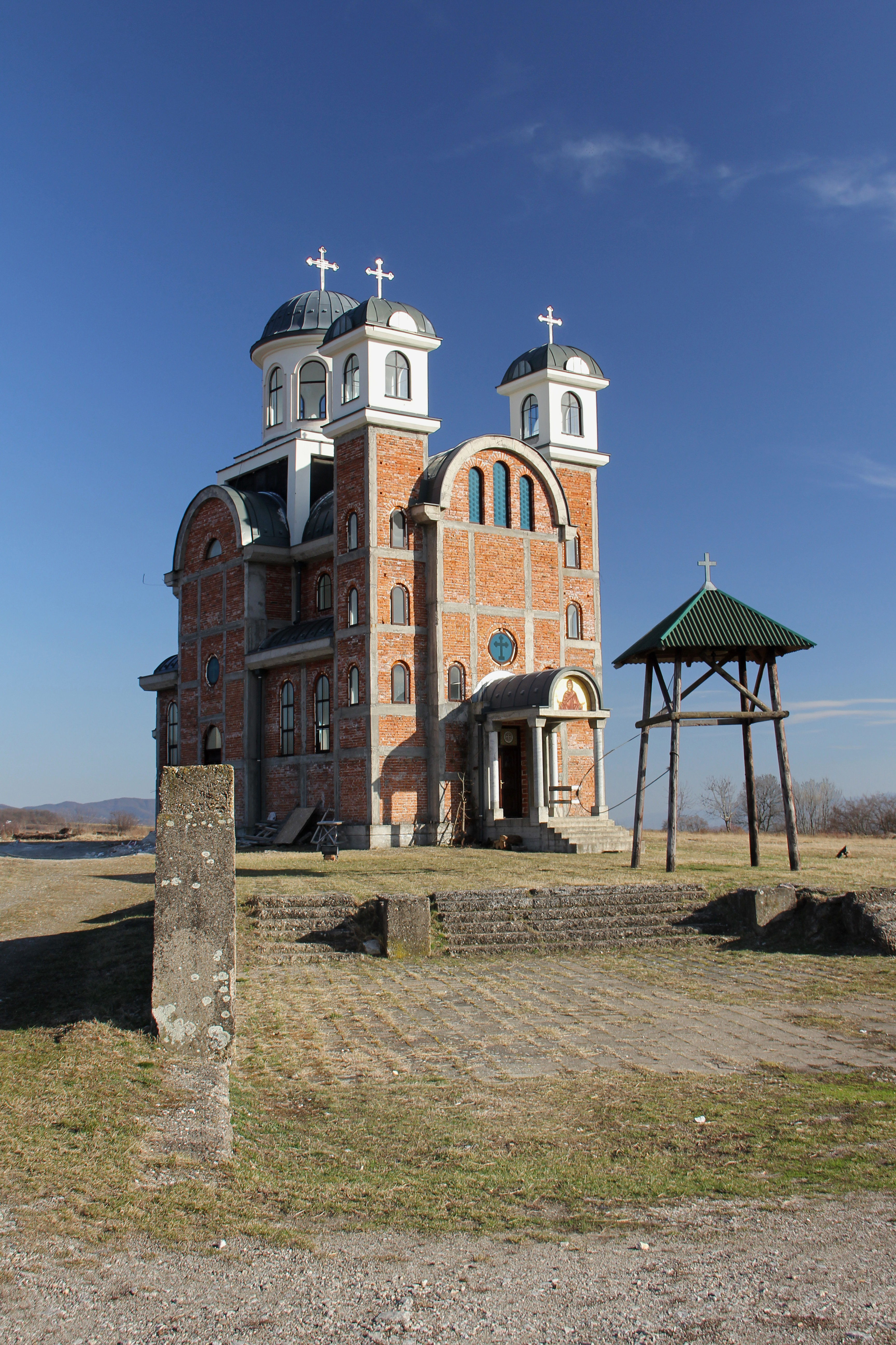 Ostra (Čačak)